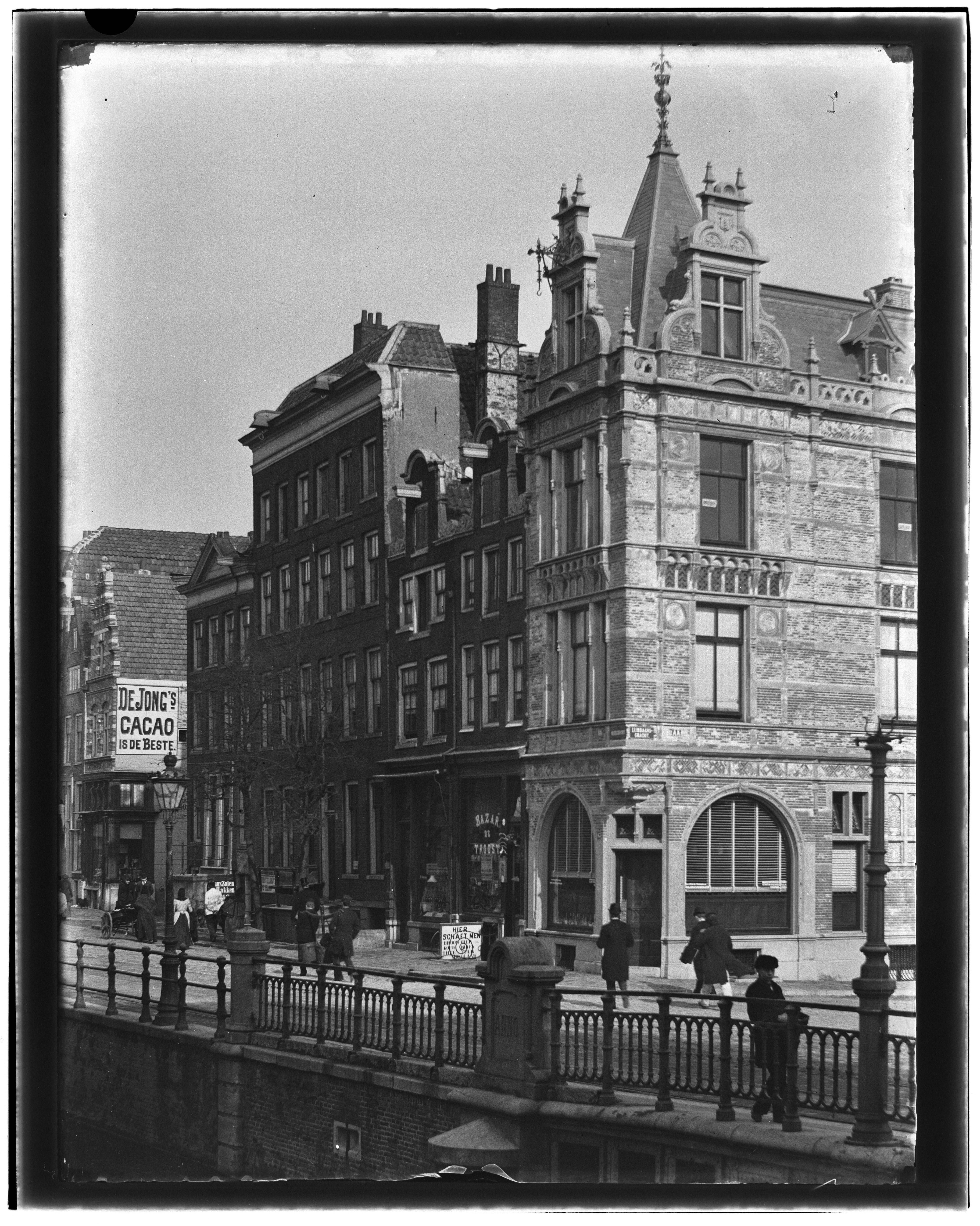 Beschrijving Vijzelgracht 51 t/m 63 (v.l.n.r.) Rechts is de Lijnbaansgracht. Op de voorgrond een gedeelte van brug nr. 86. Links is ingang Fokke Simonszstraat. Documenttype foto Vervaardiger Olie``, Jacob (1834-1905) Collectie Collectie Jacob Olie Jbz. Datering 3 maart 1894 Geografische naam Vijzelgracht Inventarissen Afbeeldingsbestand 10019A000245 Generated with Dememorixer